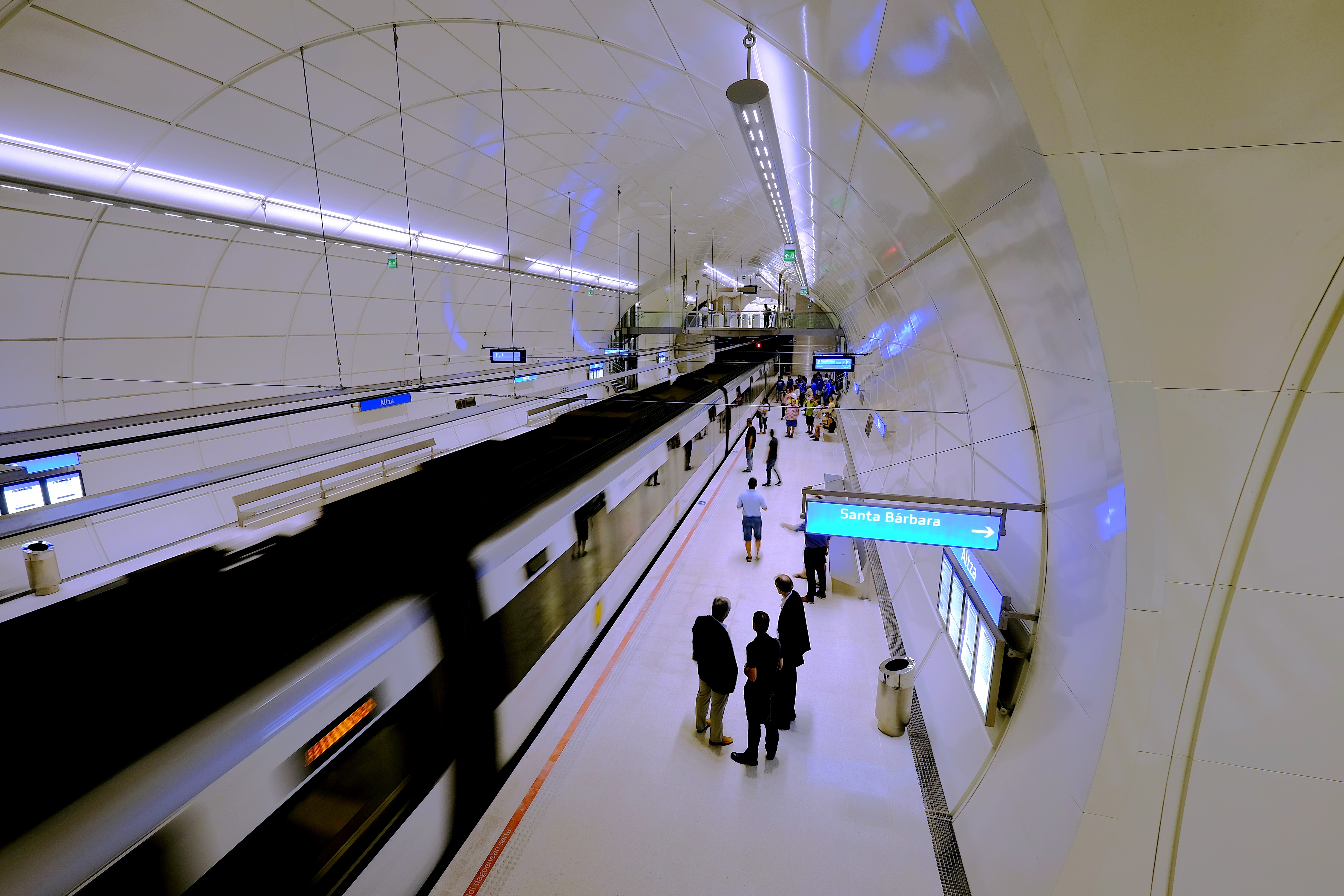 Estación de Altza